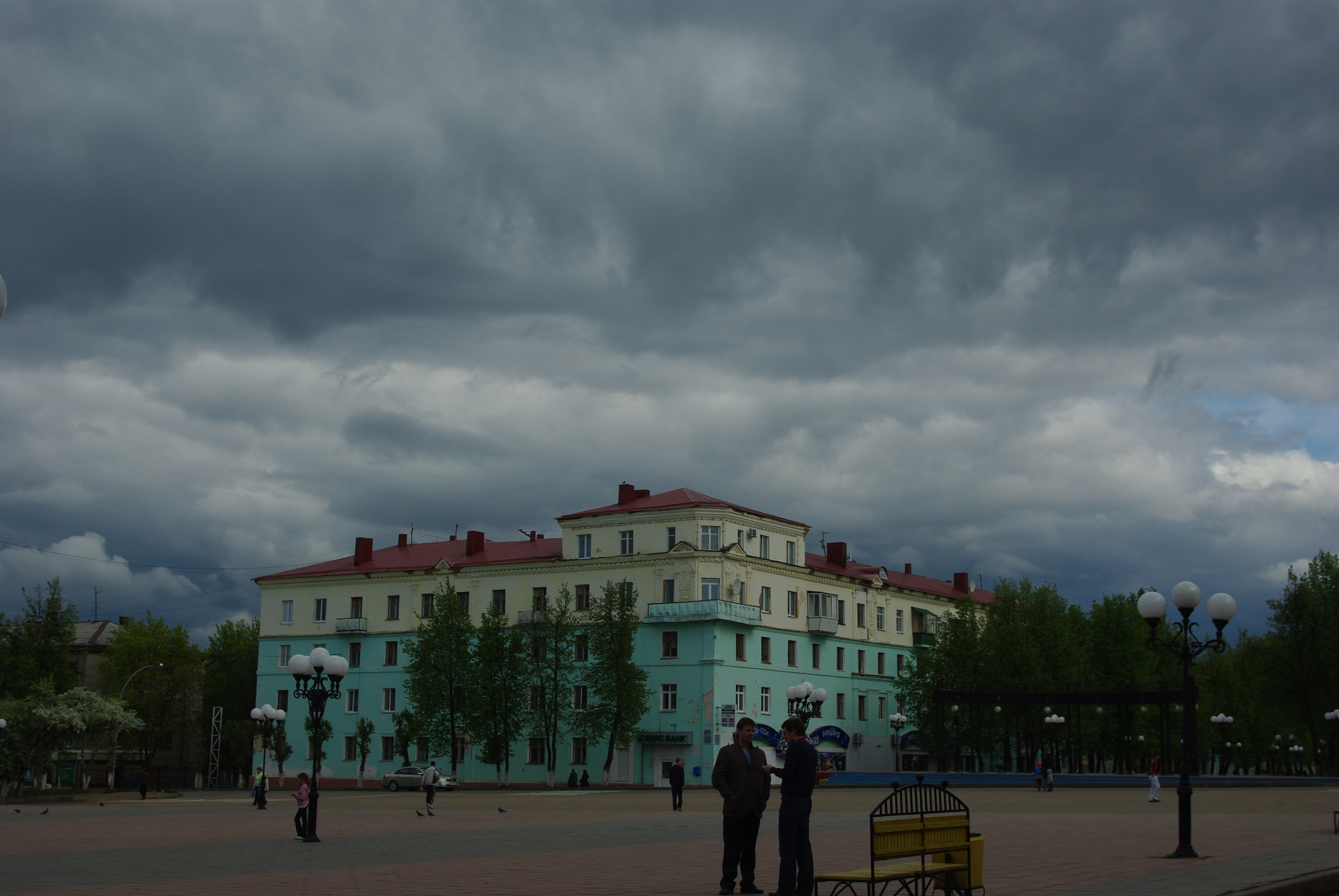 Leninogorsk